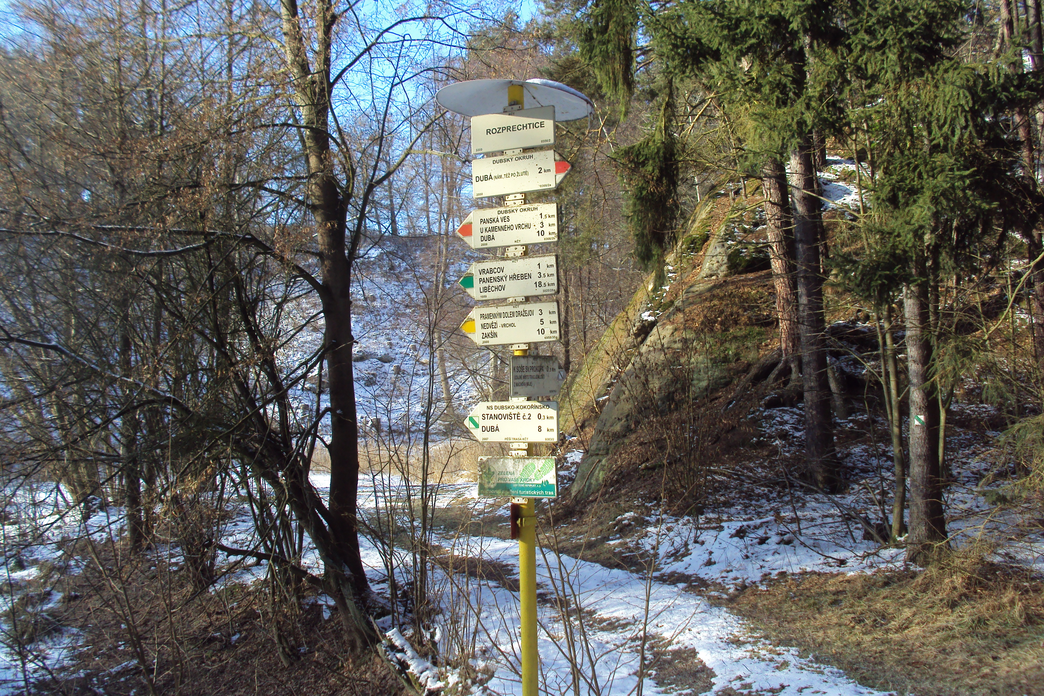 Rozcestník Rozprechtice u Dubé